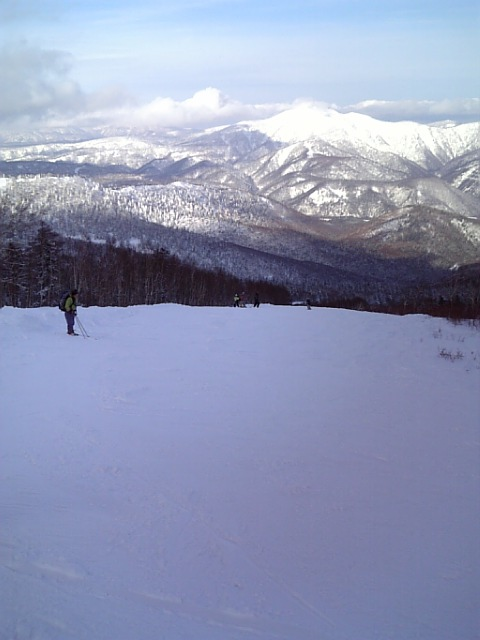 北海道遠軽町北大雪スキー場